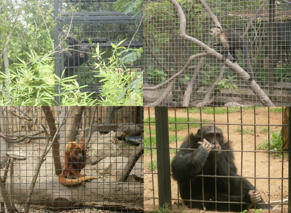 Parque Zoológico y Botánico Bararida, Barquisimeto estado Lara - Venezuela